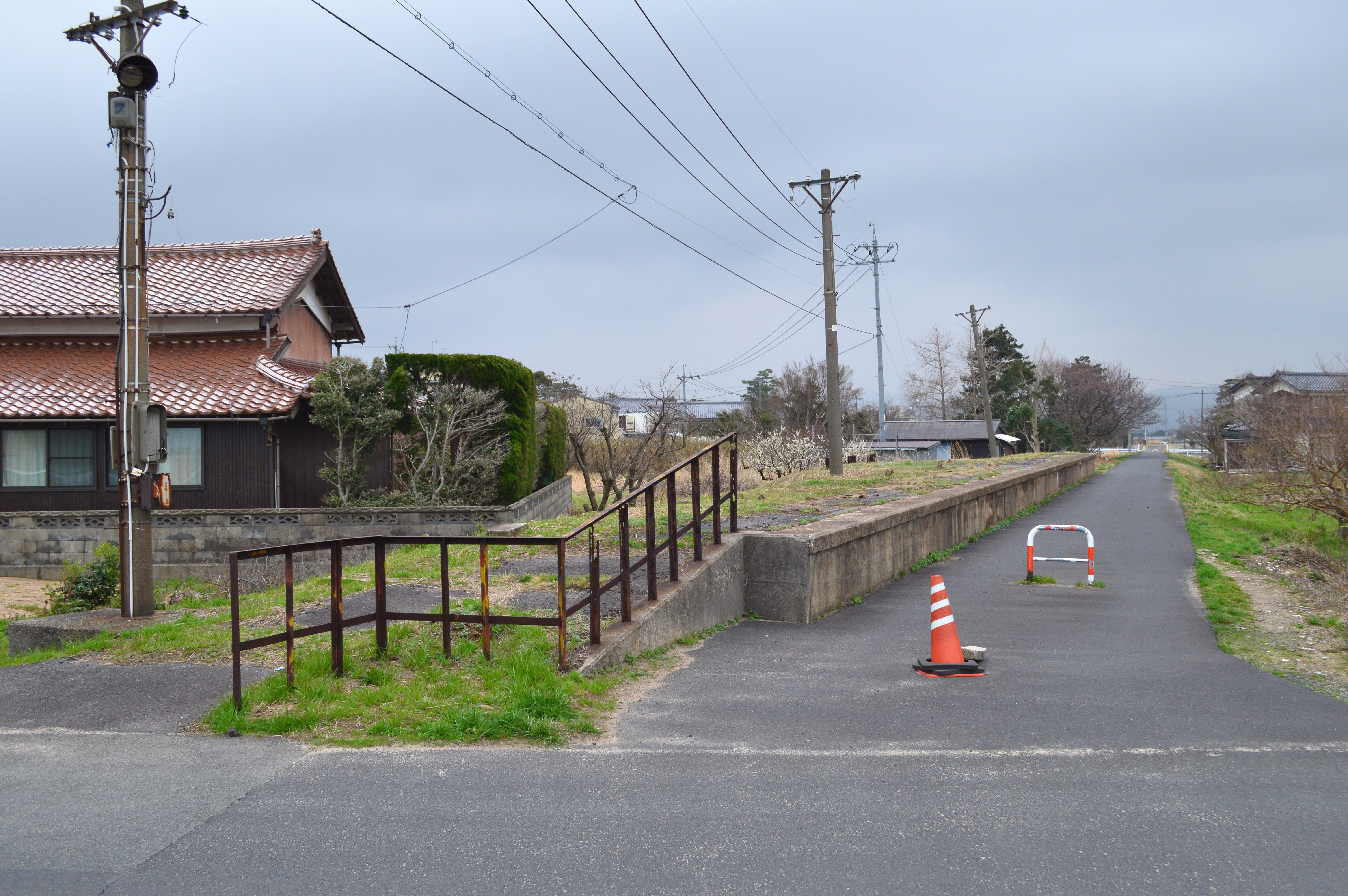 旧荒茅駅 ホーム跡